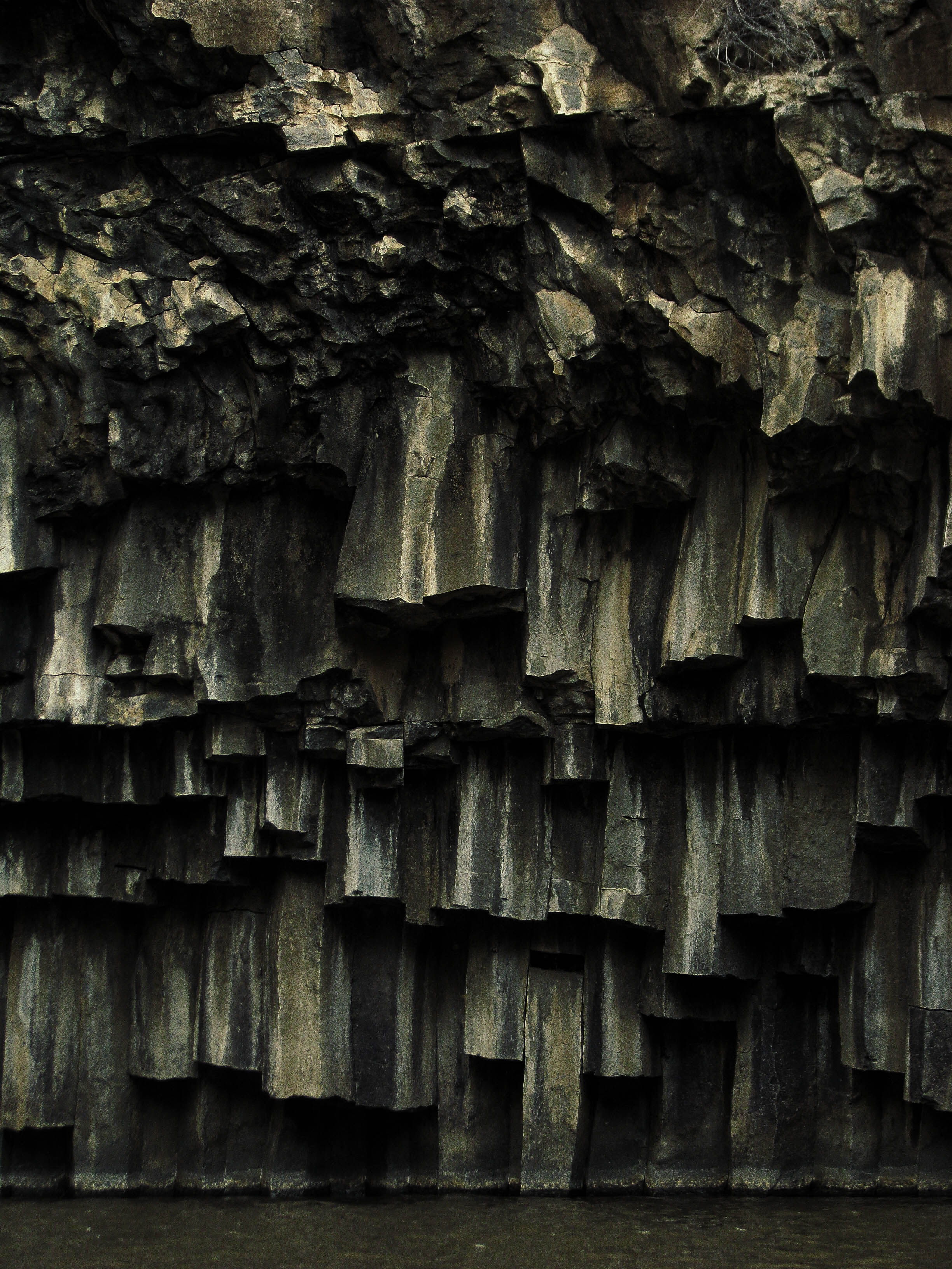 בְּרֵכַת הַמְּשֻׁשּׁים הוא כינויה של בריכה טבעית המצויה בנחל משושים בחלקה המרכזי-דרומי של רמת הגולן. הבריכה זכתה לשמה בזכות עמודי מסלע הבזלת בעלי חתך משושה.